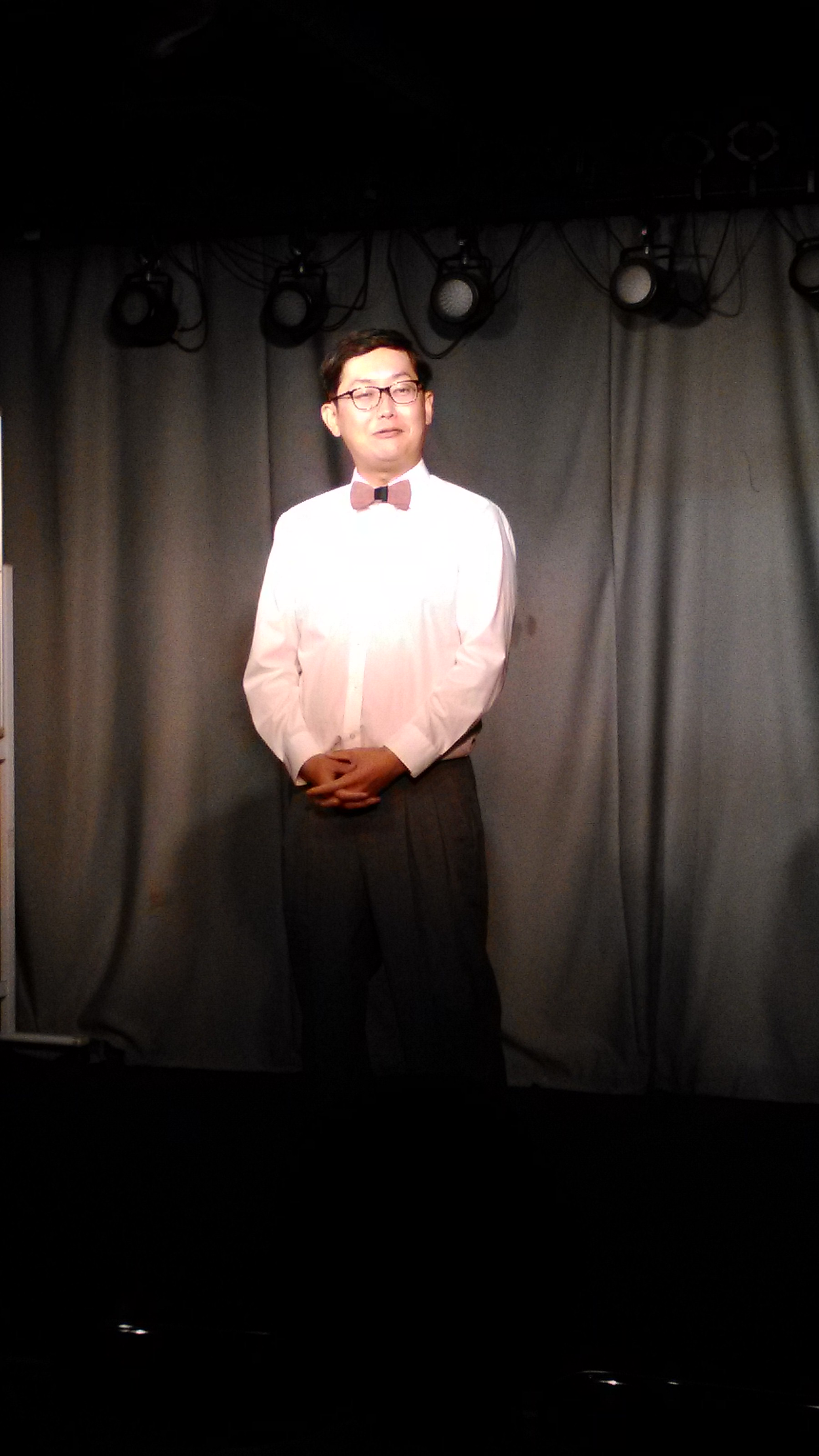 ゆっくんちゃん（芸人）の画像